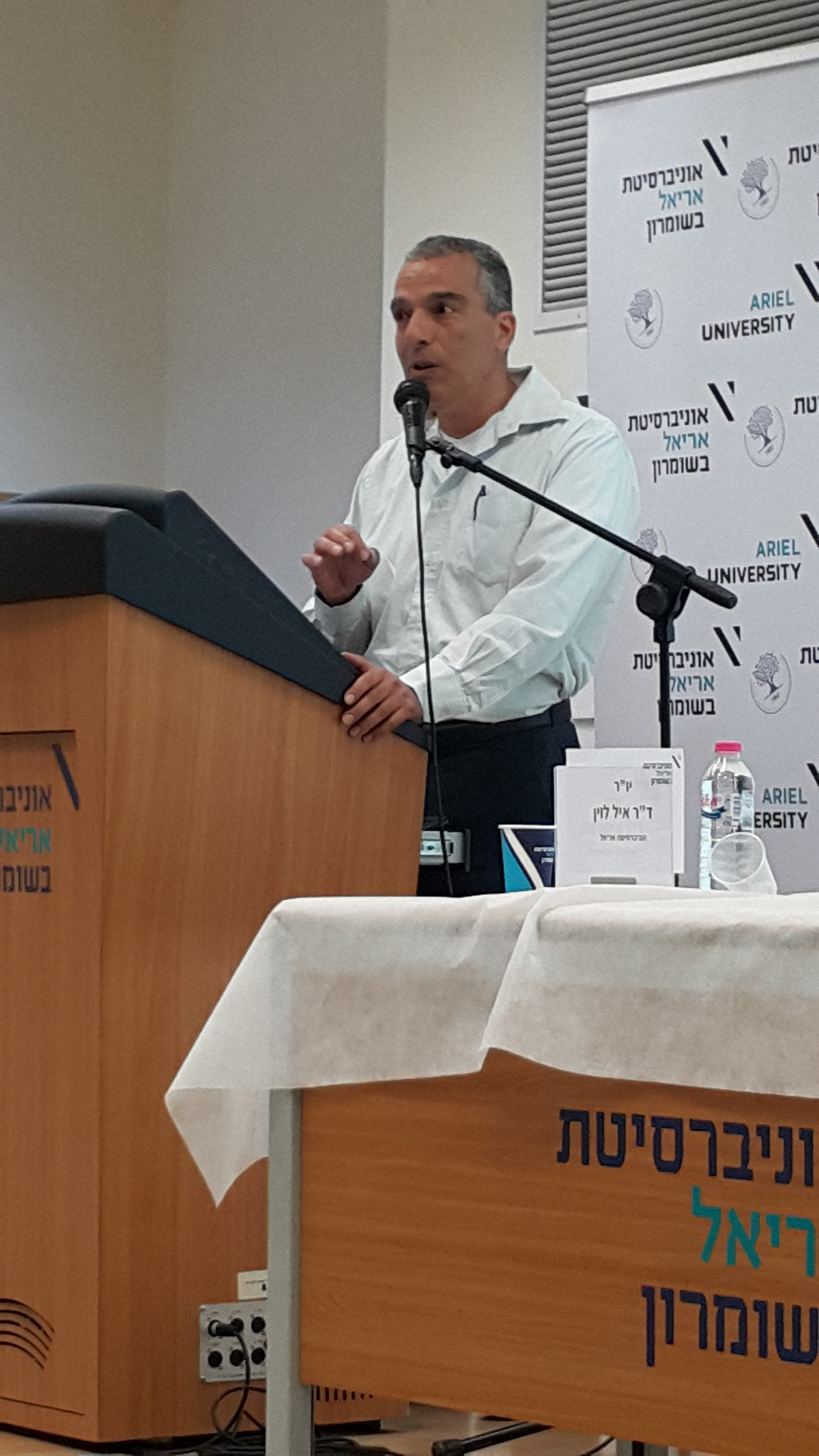 השגריר לשעבר גדעון בכר